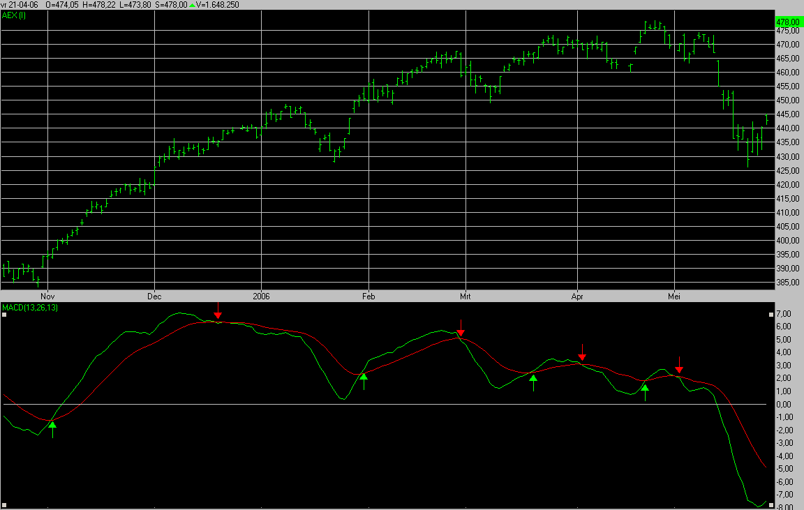 Gemaakt met Wall Street Professional